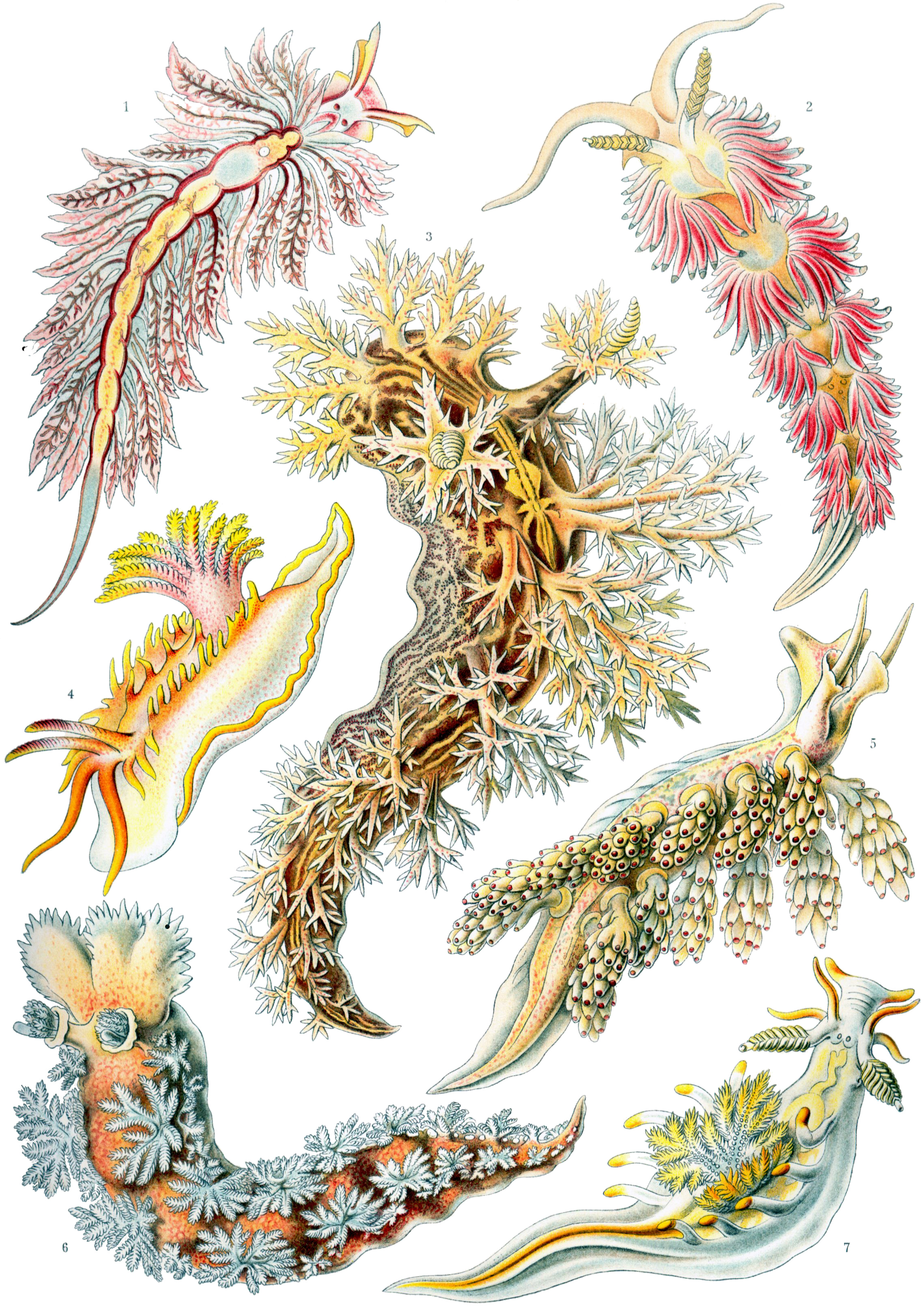 Hermaea bifida (Lovén) = Hermaea bifida (Montagu, 1815) Aeolis coronata (Forbes) = Facelina auriculata coronata (Forbes & Goodsir, 1839) Dendronotus arborescens (Alder) = Dendronotus frondosus (Ascanius, 1774) Idalia elegans (Leuckart) = Okenia elegans (Leuckart, 1828) Doto coronata (Lovén) = Doto coronata (Gmelin, 1791) Tritonia Hombergii (Cuvier) = Tritonia hombergii Cuvier, 1803 Ancula cristata (Lovén) = Ancula gibbosa (Risso, 1818)